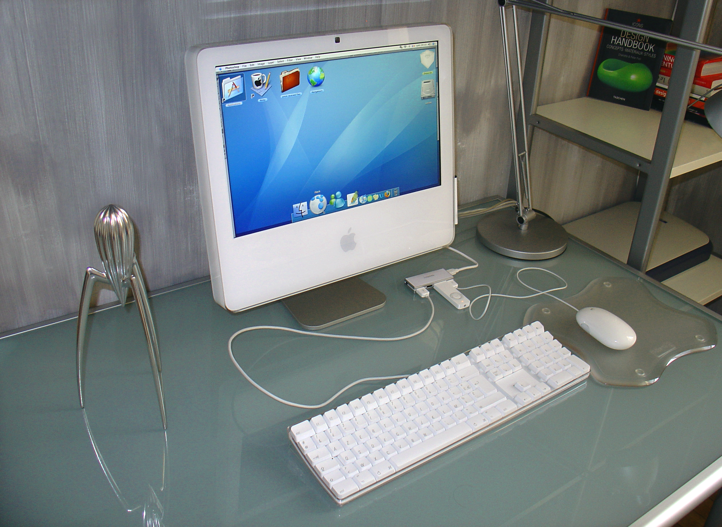 Core Duo 17" (acheté en juin 2006)